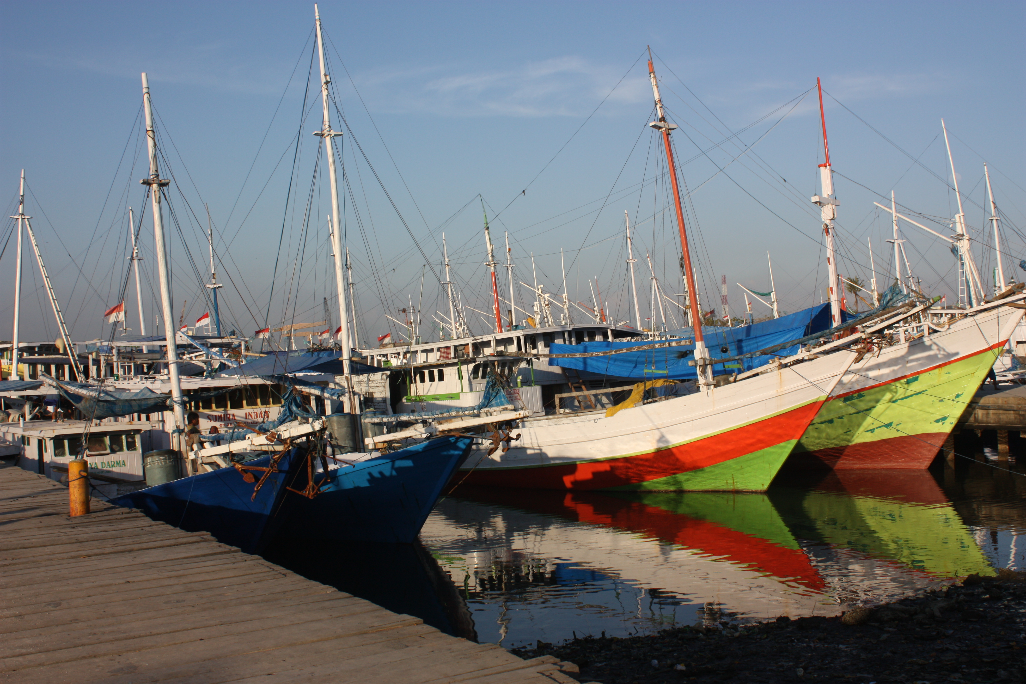 Makassar, old harbour